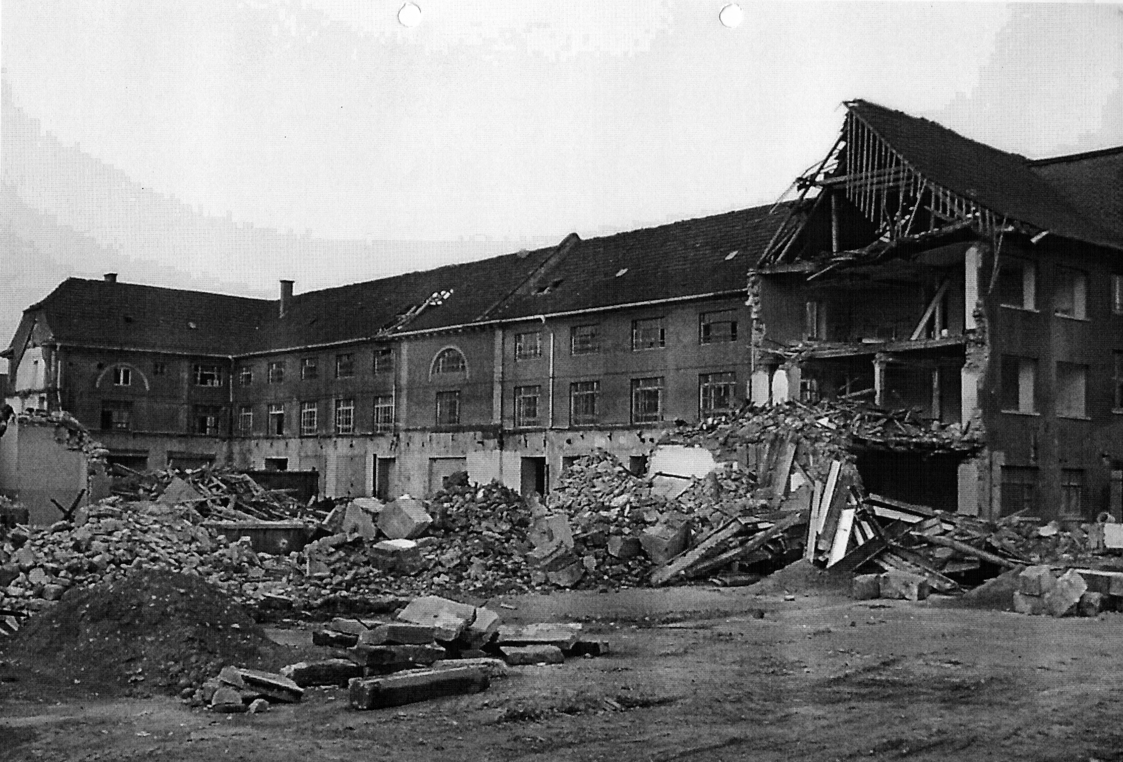 Martinskaserne, Ostseite beim Abbruch 2004